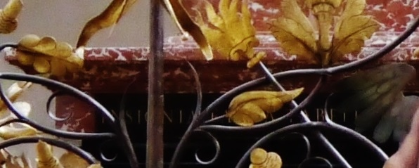 Innsbruck, Hofkirche, Kenotaph Kaiser Maximilians I., Detail der umlaufenden Widmungsinschrift